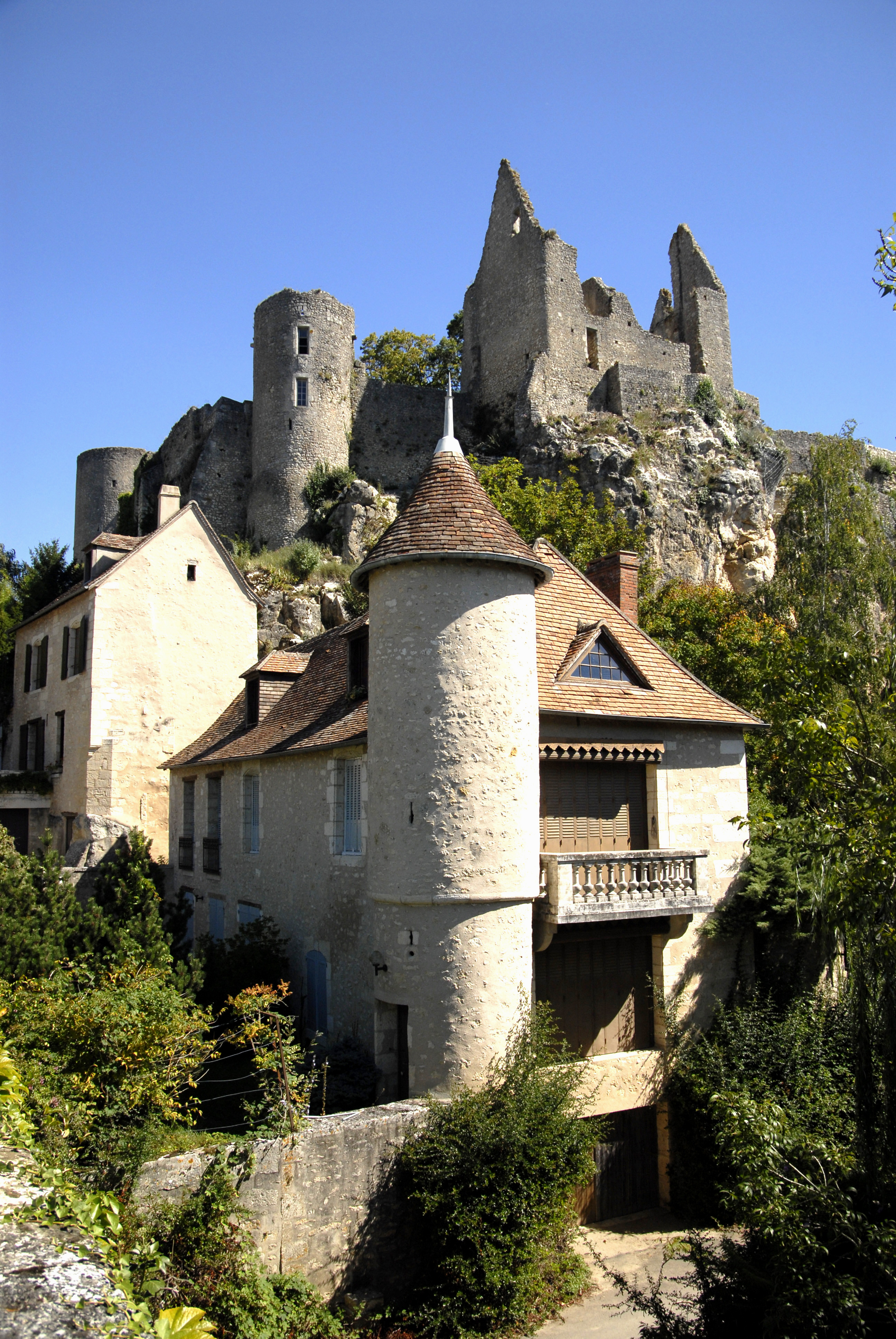 Angles-sur-l'Anglin, im Unterdorf